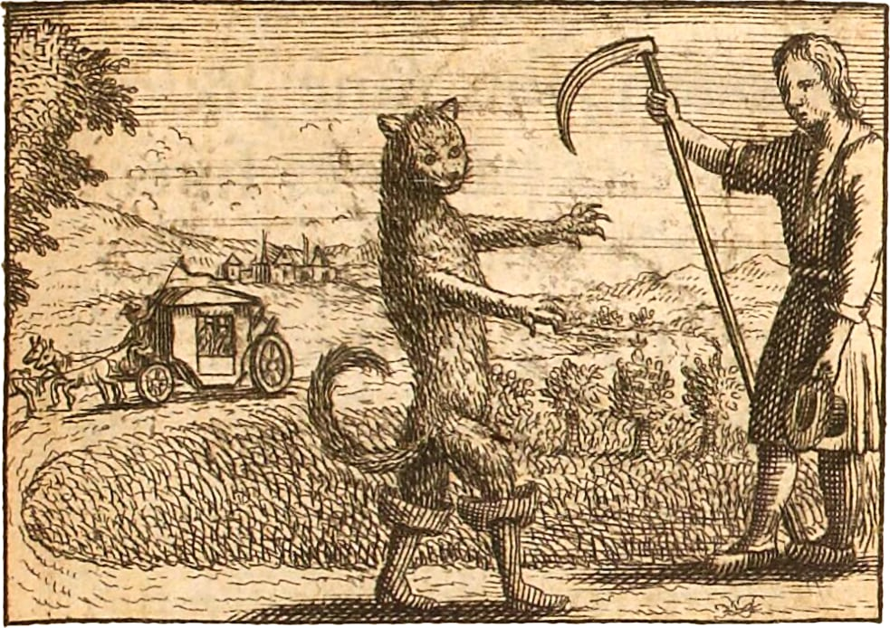 Gravure des Histoires ou Contes du temps passé de Charles Perrault, édition Barbin 1697, Paris. Gravure sur cuivre conservée à la Bibliothèque nationale de France.